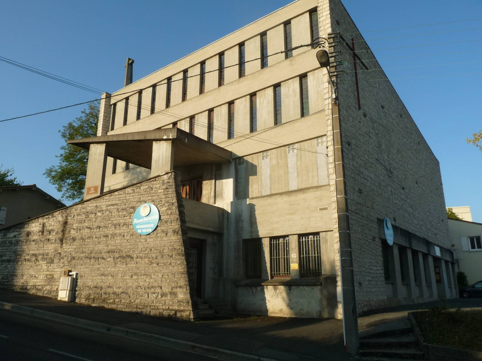 église Ste-Bernadette, Angoulême (16), France